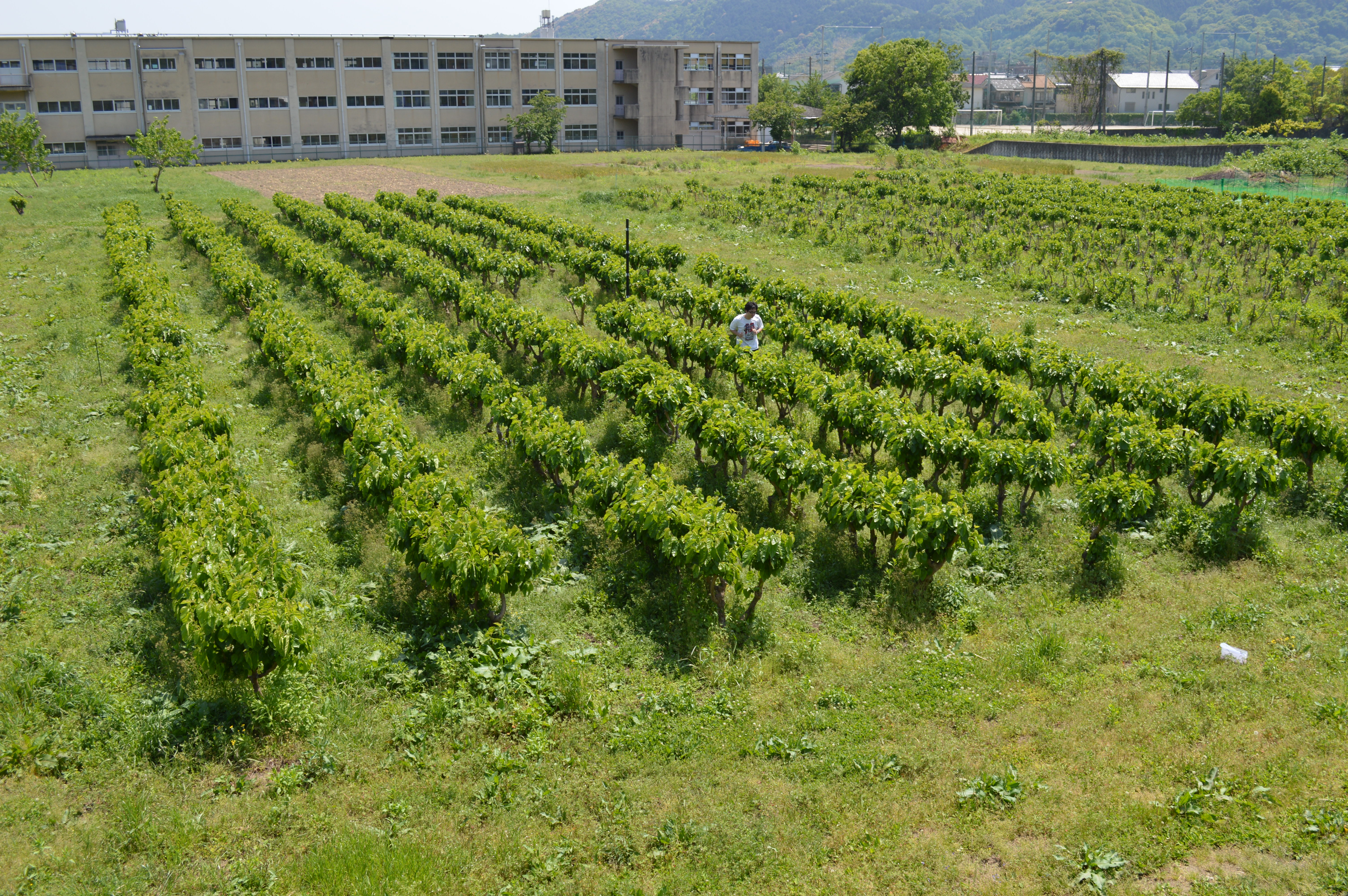 京都工芸繊維大学嵯峨キャンパスの圃場（各種栽培ゾーン）、奥は京都市立嵯峨中学校